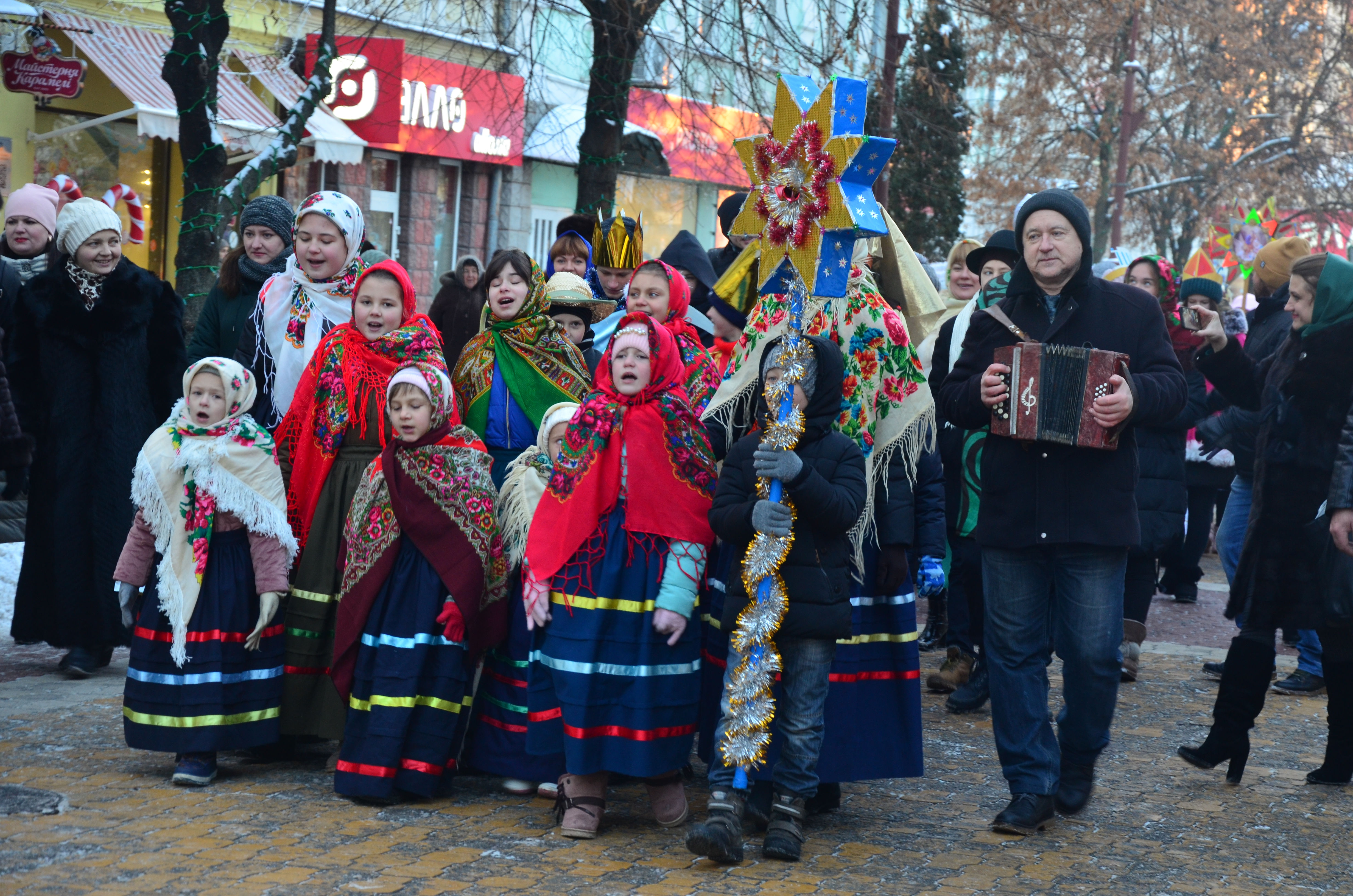 8 января в центре Хмельницкого десятки творческих коллективов прошли от Детского мира до кинотеатра Т.Г. Шевченка, исполняя колядки.